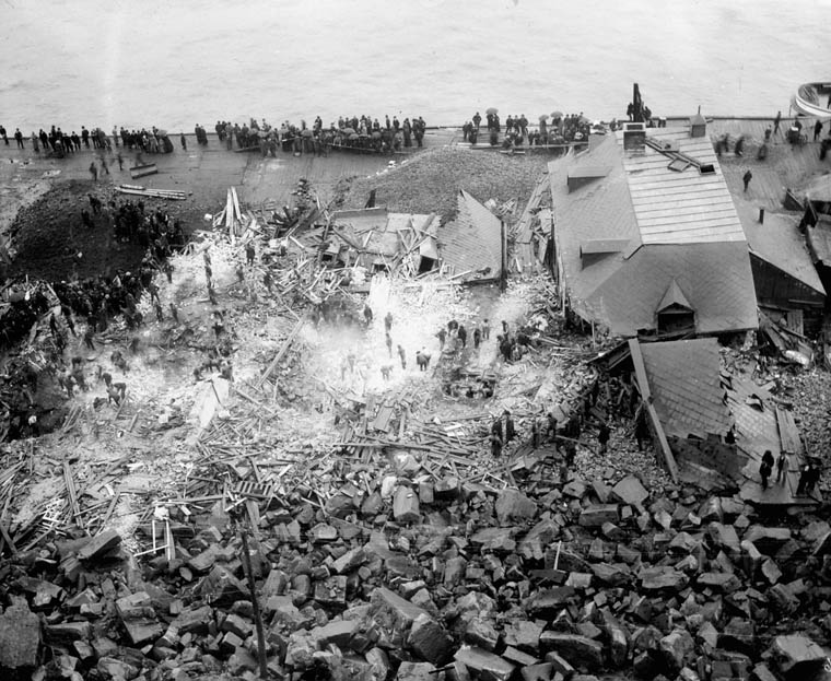 Éboulement de 1889 à Québec